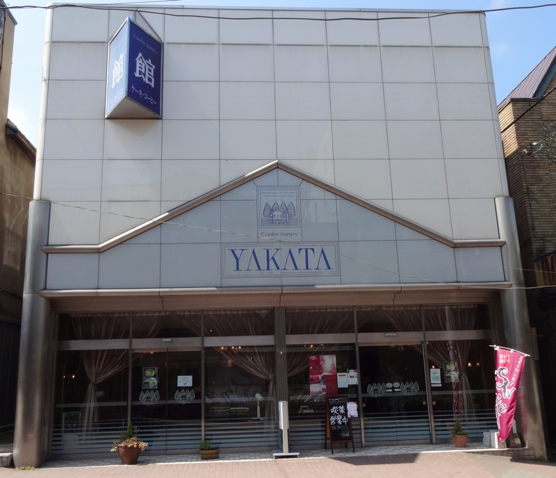 館 BLANCHE (Cake shop, Otaru-shi, Japan)